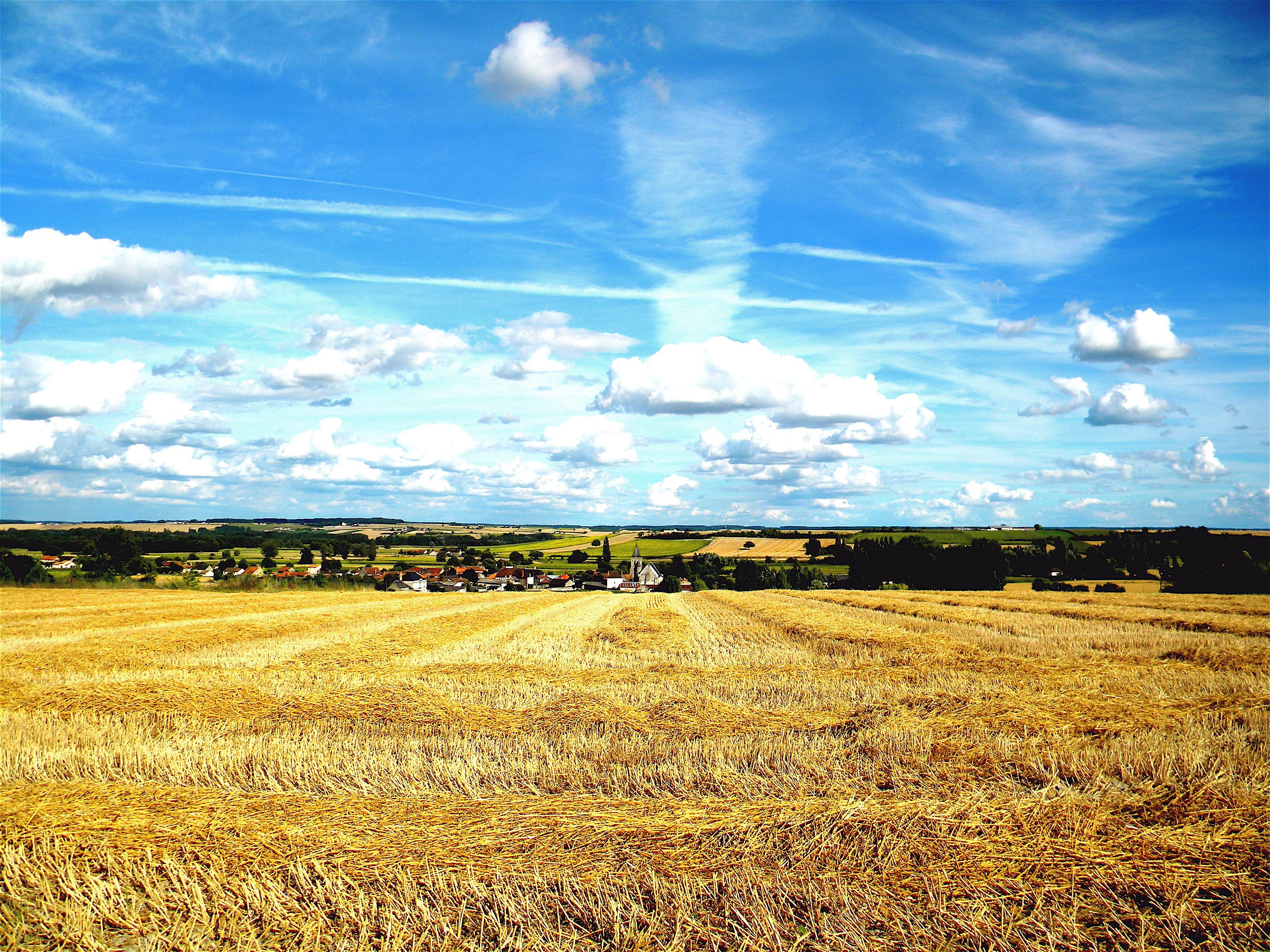 Le village de Saint Christophe